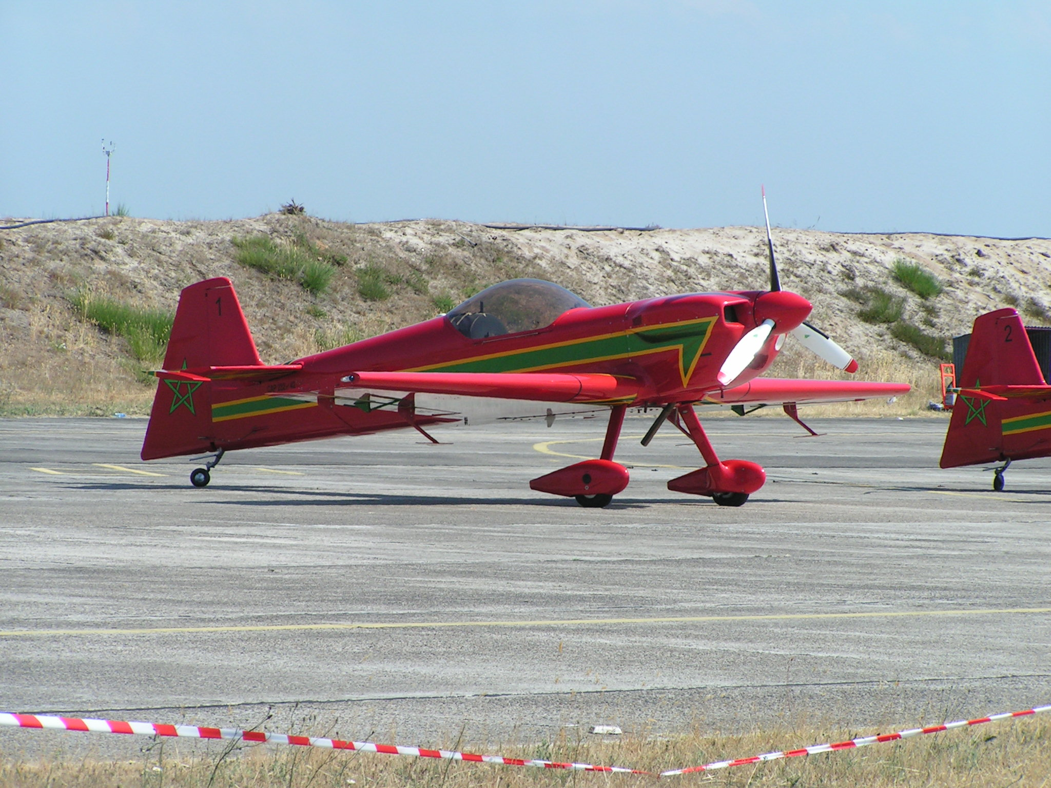 Cap 230 la marche verte, meeting Cazaux (33)